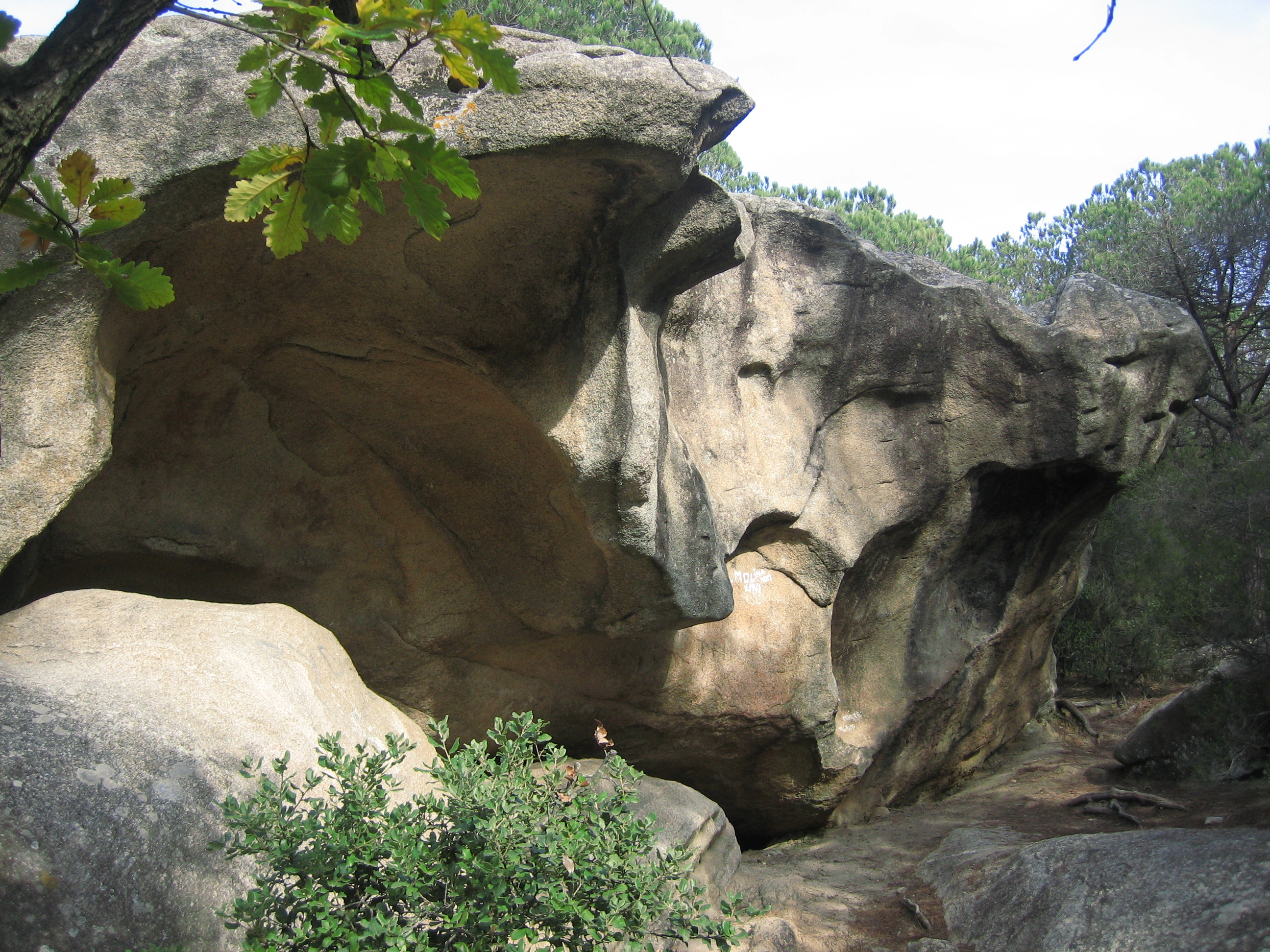 Bloc granític anomenat "Pedra de les orenetes"